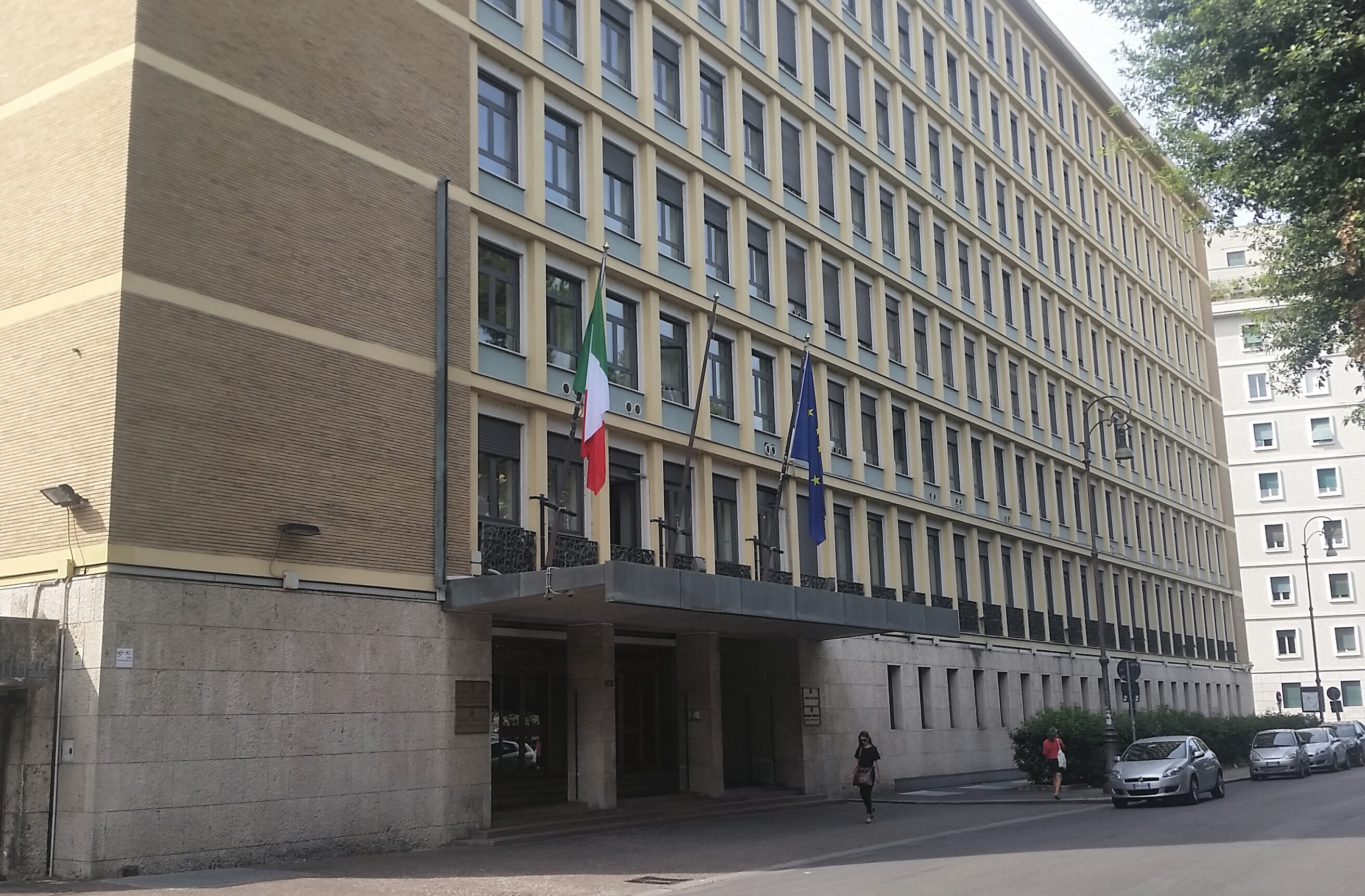 Corte dei Conti - Sede centrale di Viale Mazzini a Viale Giuseppe Mazzini, n. 105, Roma